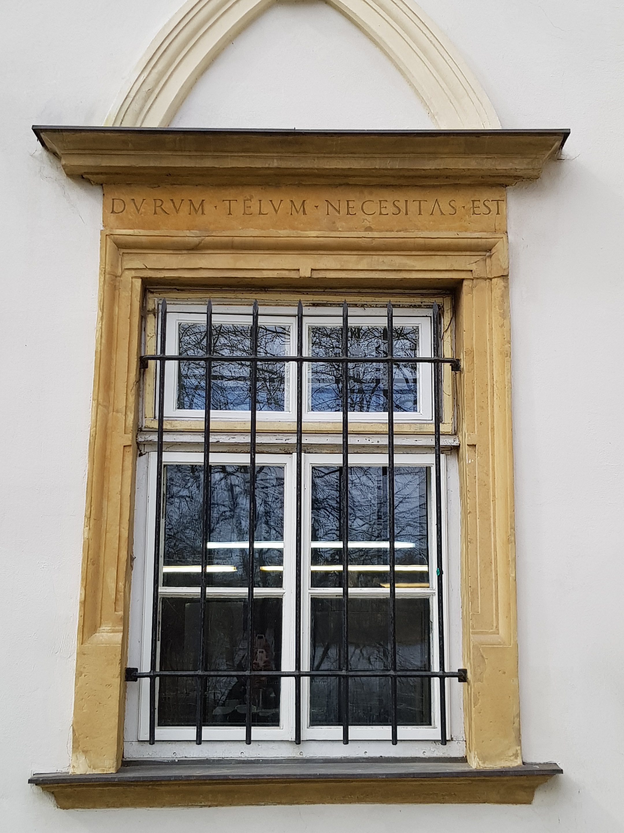 Obramienie okienne z zameczku w Radziejowicach